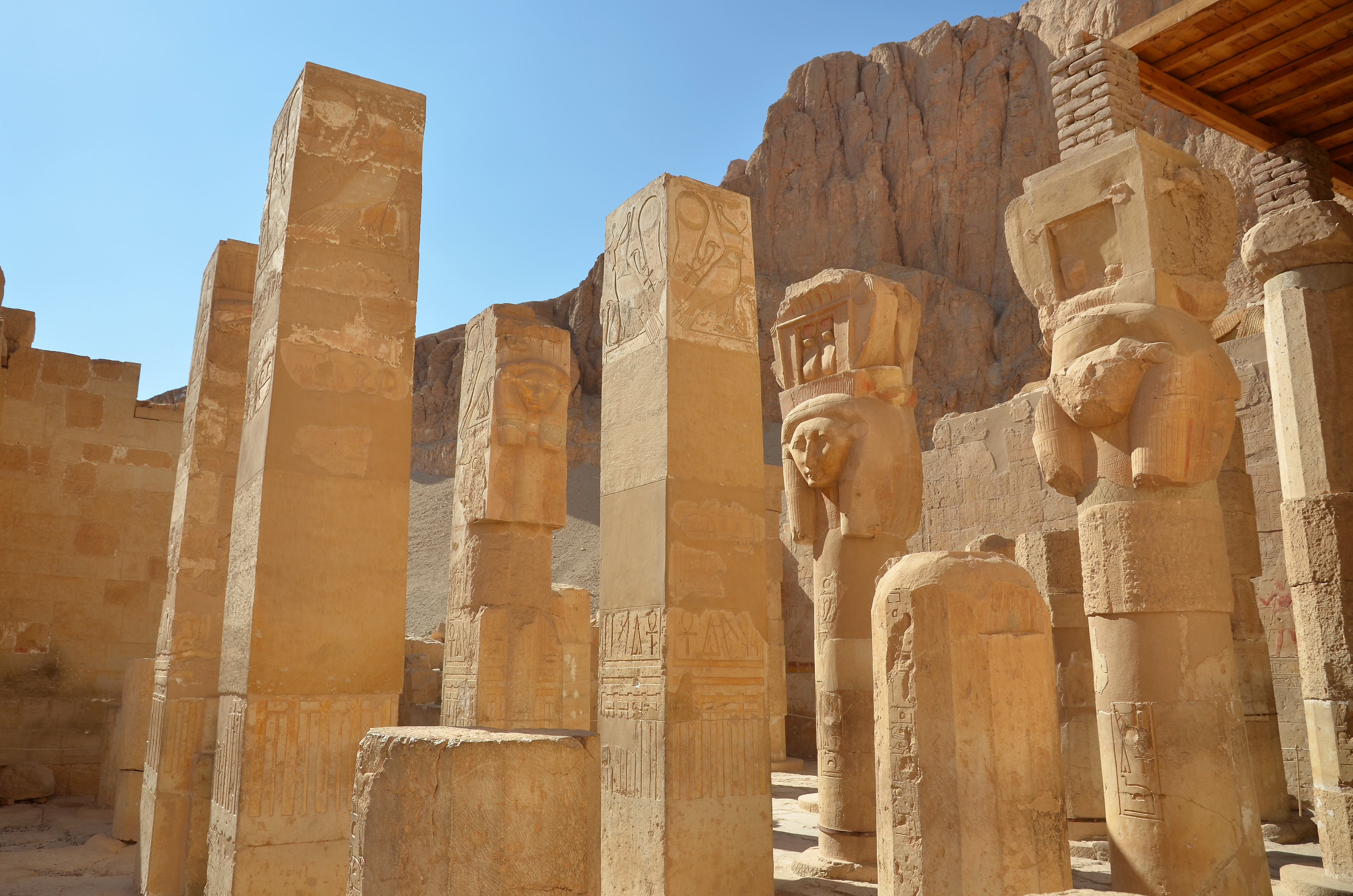 Chrám královny Hatšepsovet